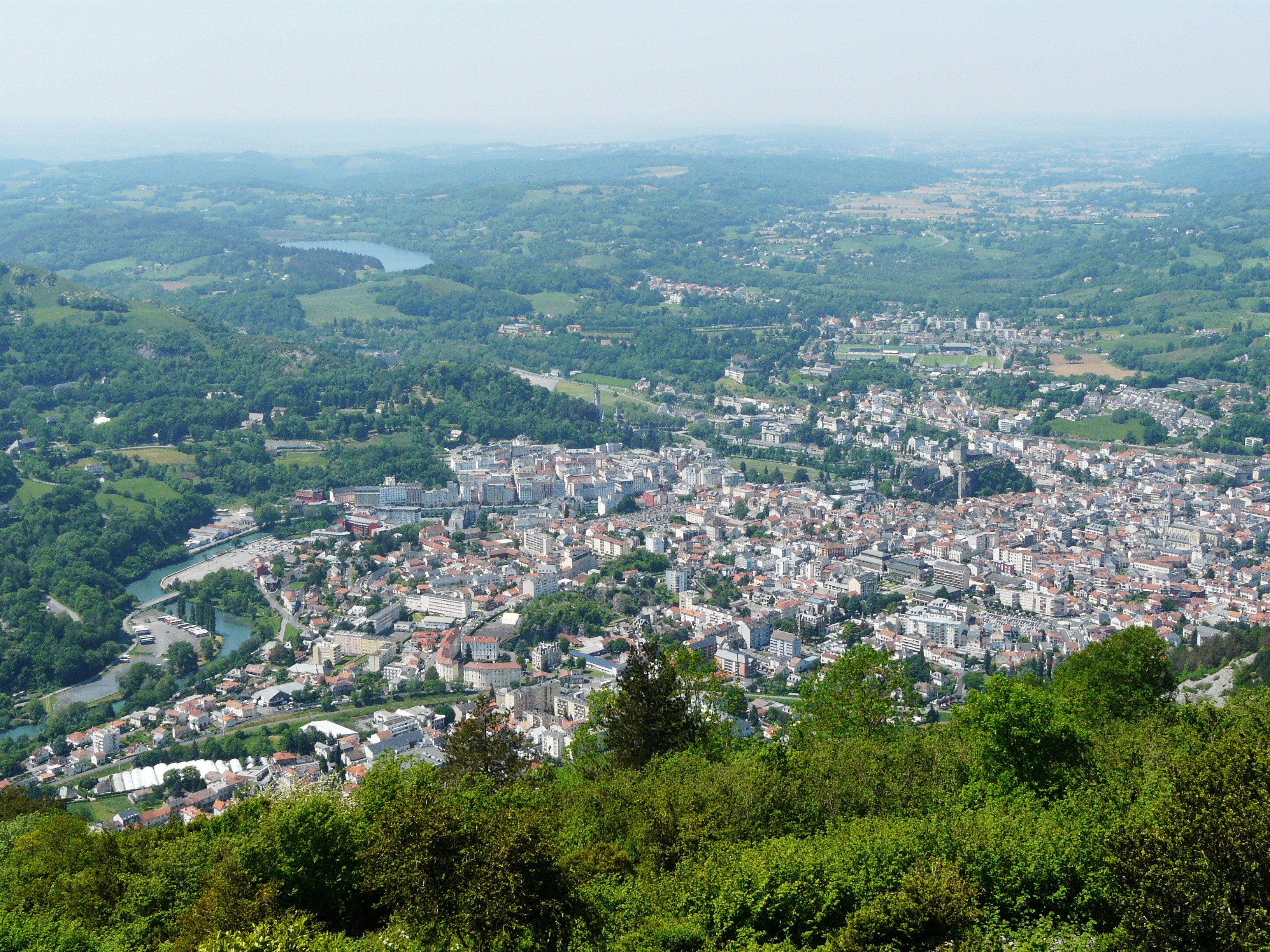 La ville de Lourdes vue depuis le pic du Jer, Hautes-Pyrénées, France. En haut sur la gauche, le lac de Lourdes.